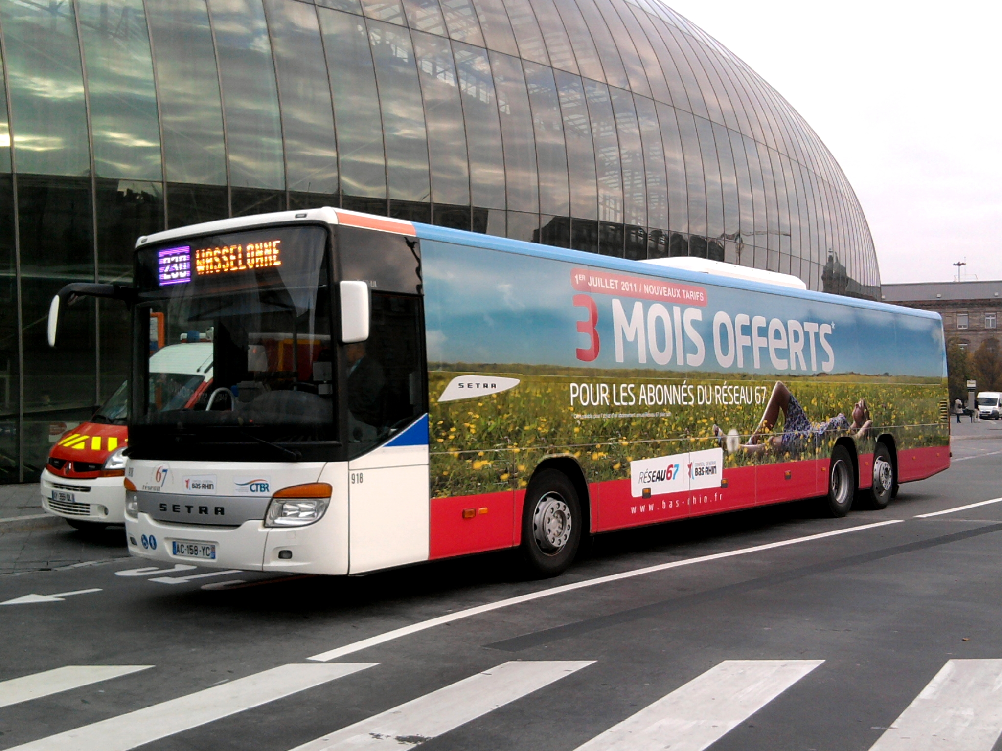 Setra S 419 UL du Réseau67 sur la place de la Gare, Strasbourg